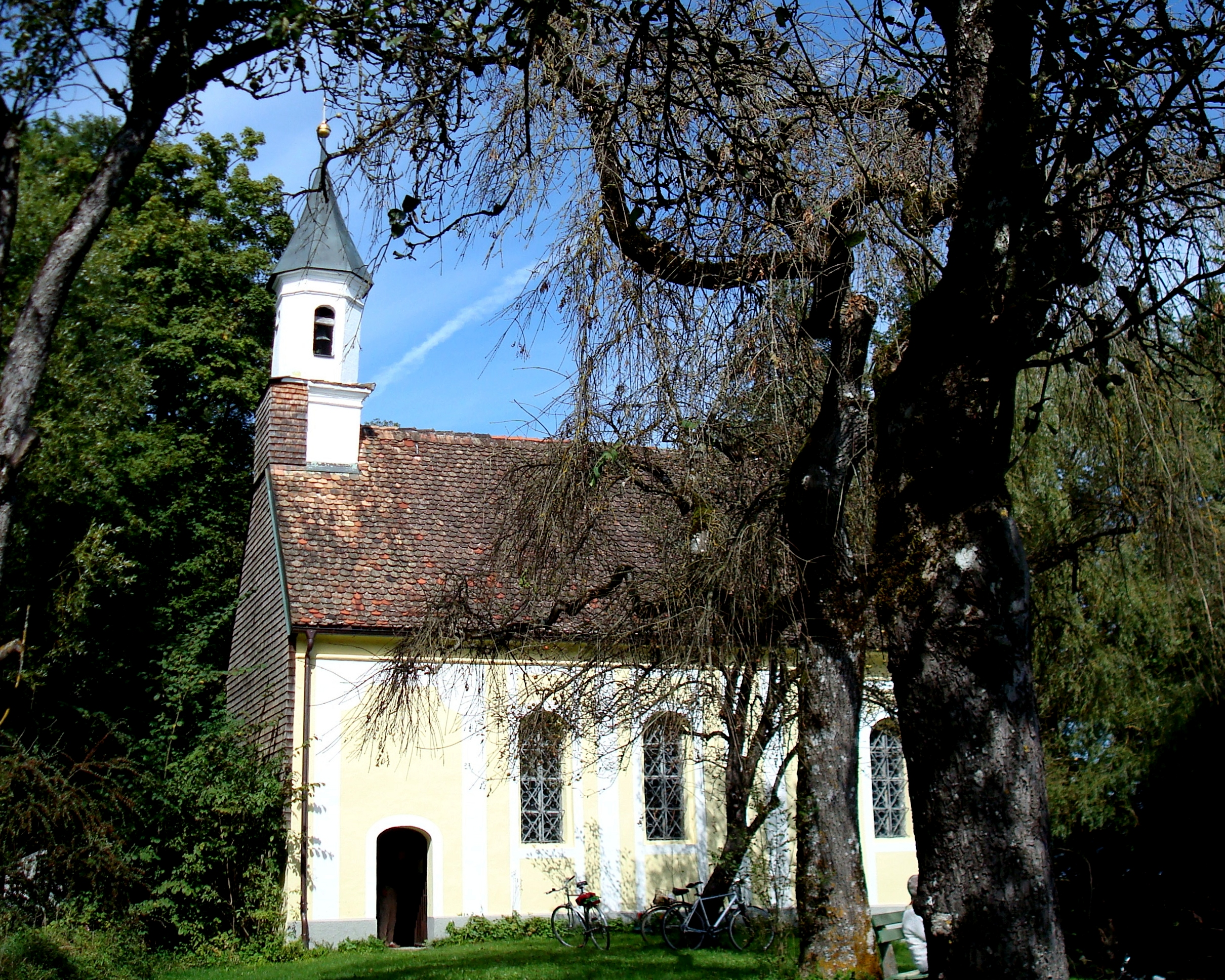 Seeshaupt, OT Seeseiten 4, Kapelle St. Jakobus der Ältere. Die Kapelle, ein verputzter barocker Saalbau mit eingezogener Apsis und Dachreiter, wurde 1746 von Michael Bauhofer erbaut. This is a photograph of an architectural monument.